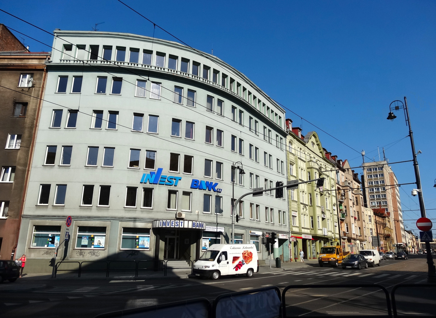 Ulica Dworcowa w Bydgoszczy na odcinku od ul. Królowej Jadwigi do dworca PKP